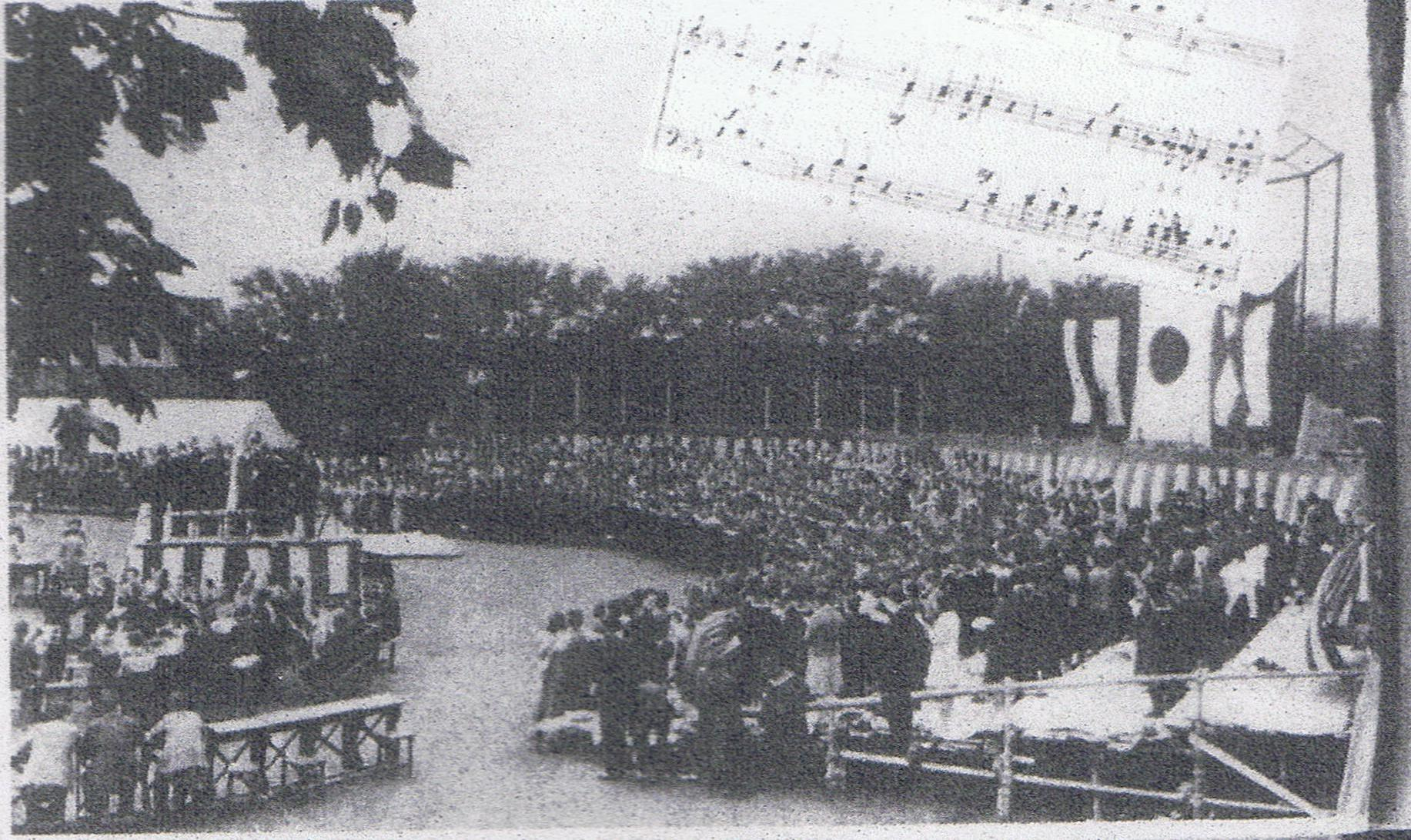 皇紀二千六百年奉祝全国基督教信徒大会聖歌隊